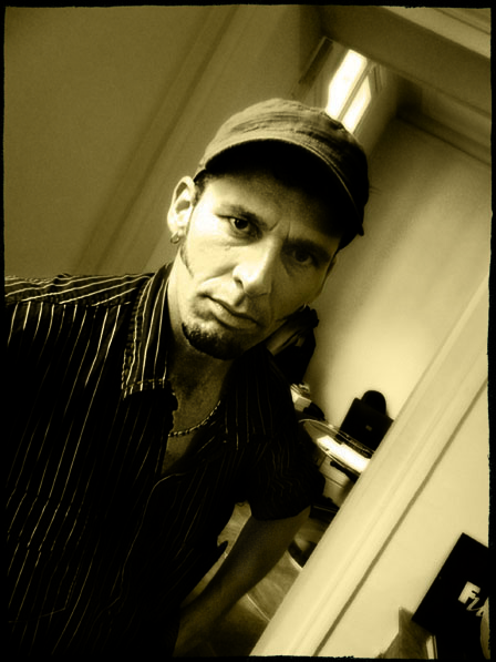 Photo portrait du scénariste Kris.